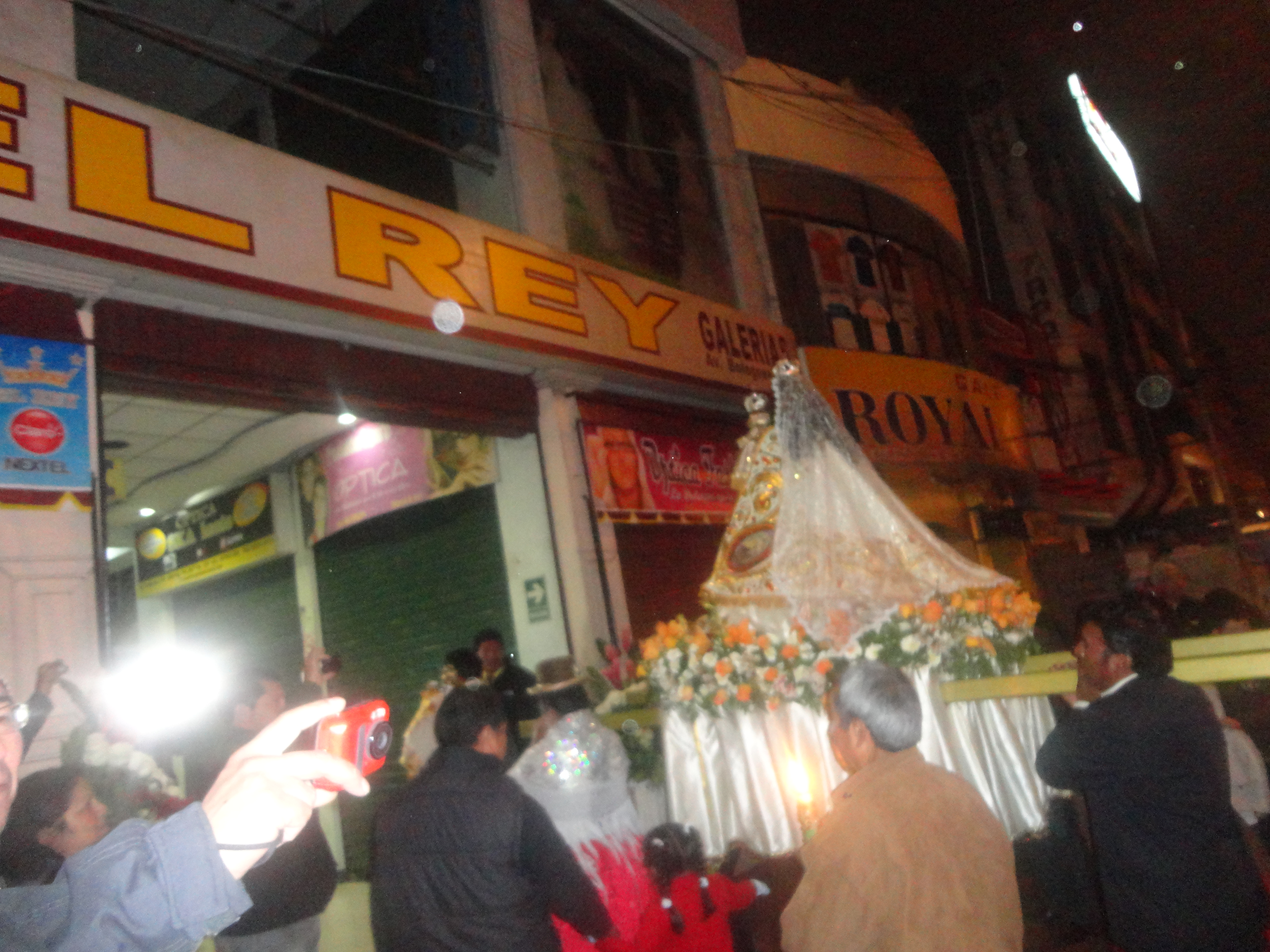 Virgen del Carmen Patrona El Rey